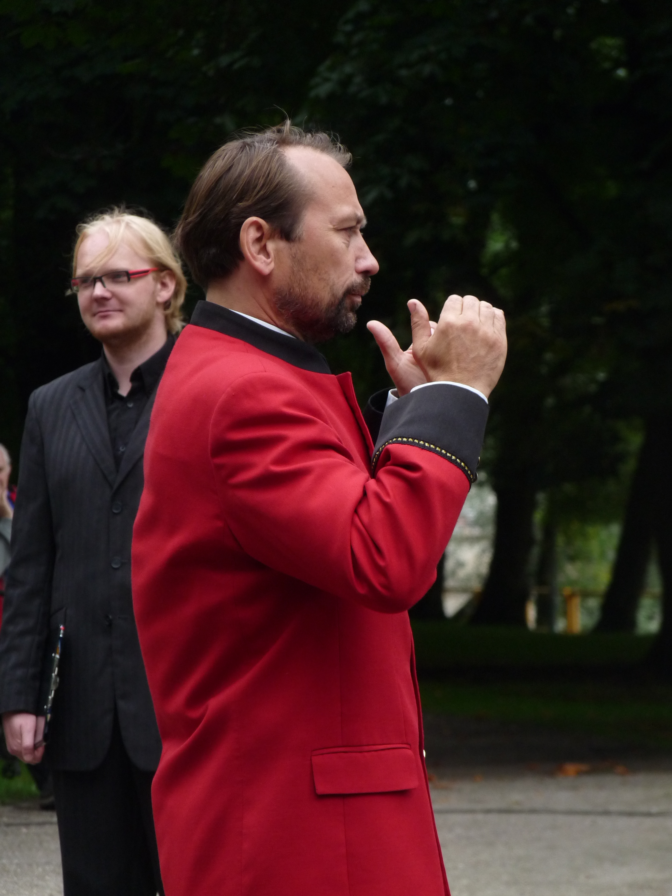 Puhkpilliorkestri Tartu dirigent Margus Kasemaa Eesti taasiseseisvumispäeva tähistamisel Tartu vabadussamba juures, 20. august 2012